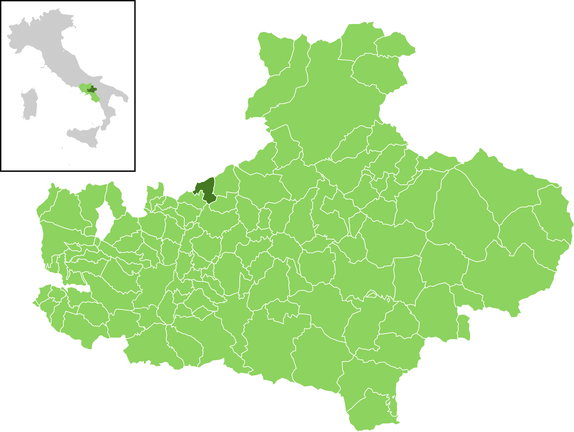 Posizione del comune all'interno della provincia di Avellino